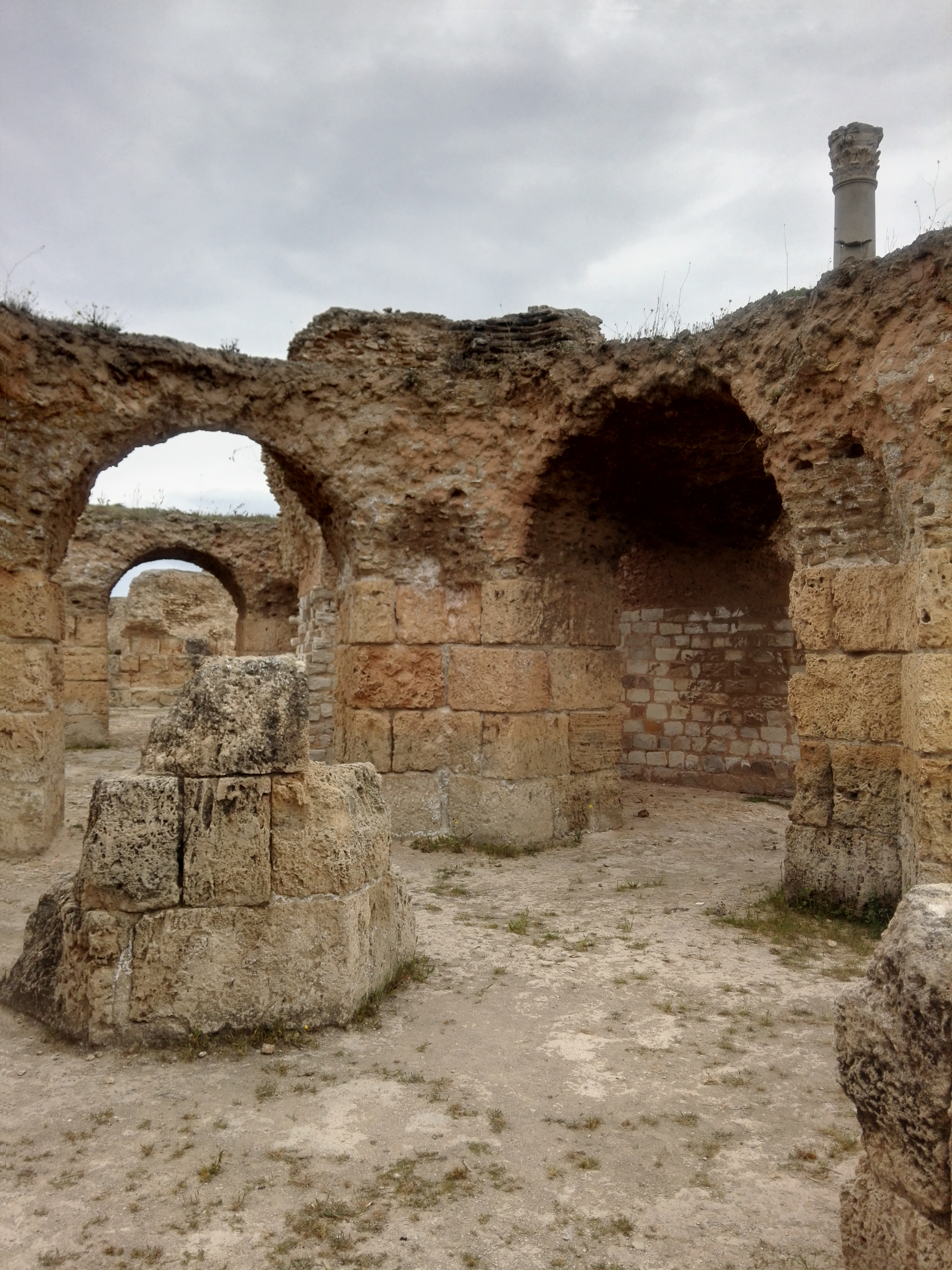 Site archéologique des Thermes d'Antonin